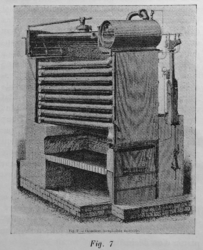 extrait de la "revue régionale illustrée" de mars 1900.